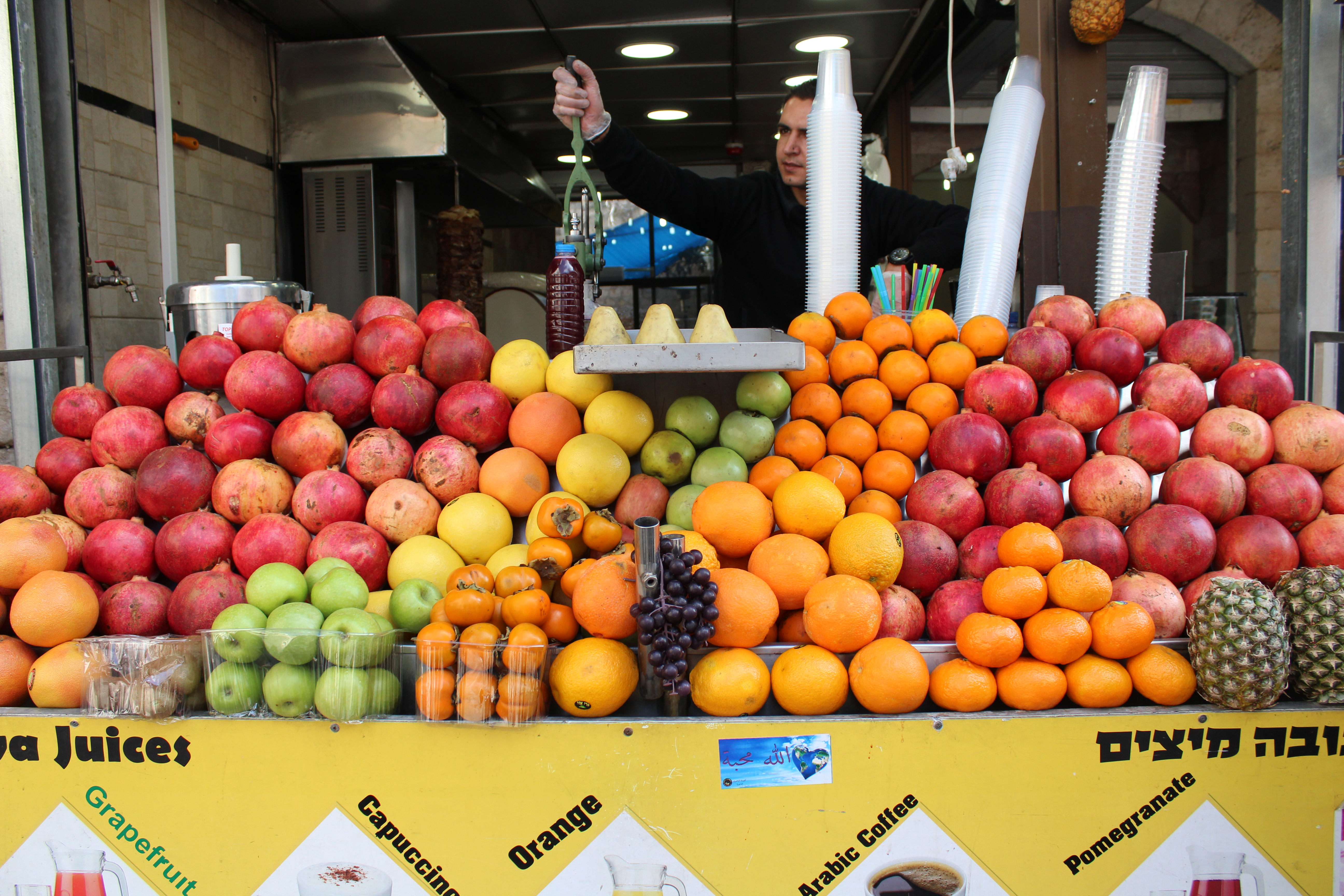 2016 דוכן של מיצי פירות שצולם בשוק בנצרת